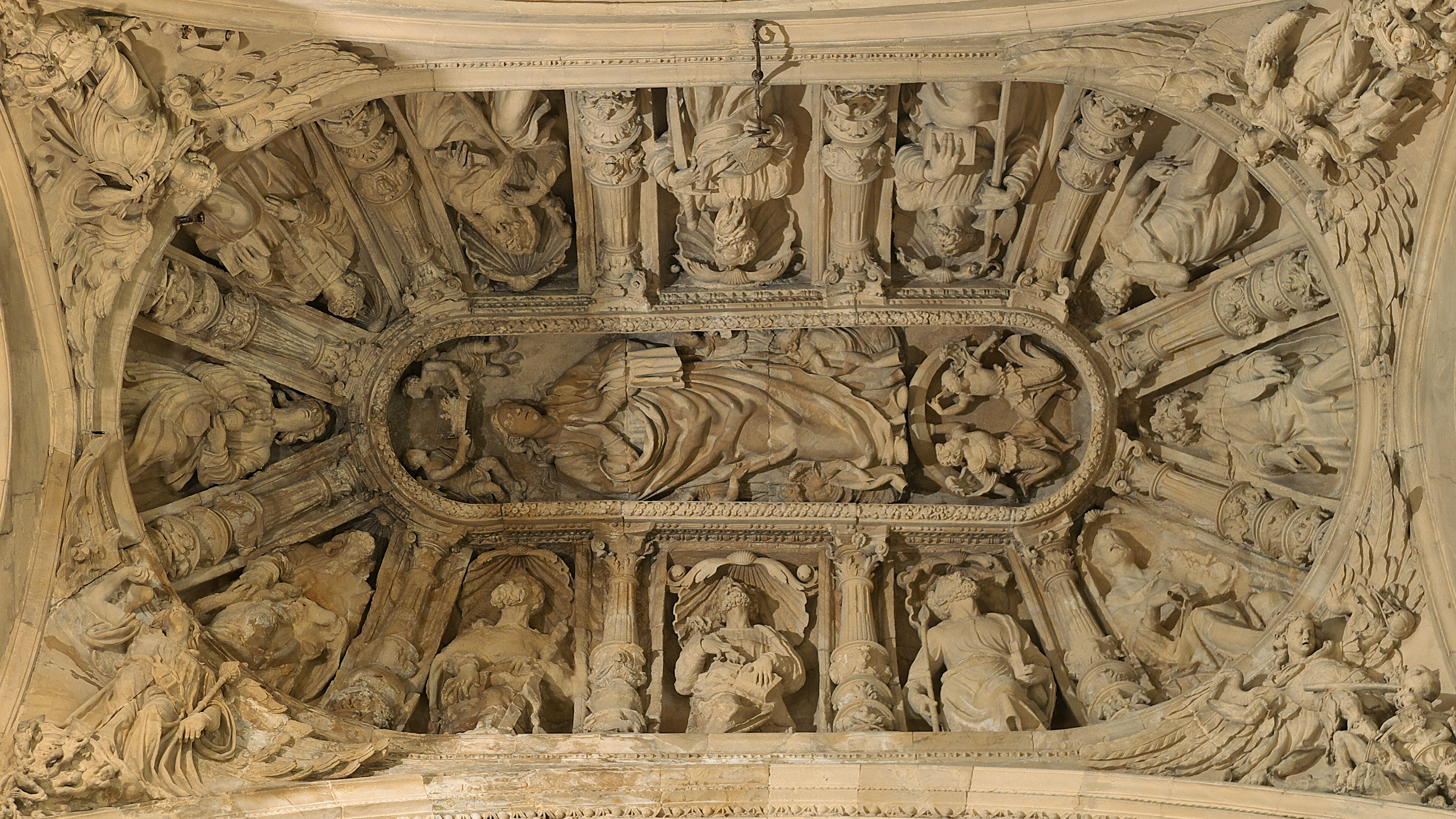 La Coronación de la Virgen (Martín de Gainza 1543). Cubre el altar principal de la sacristía proyectada por Diego de Riaño.